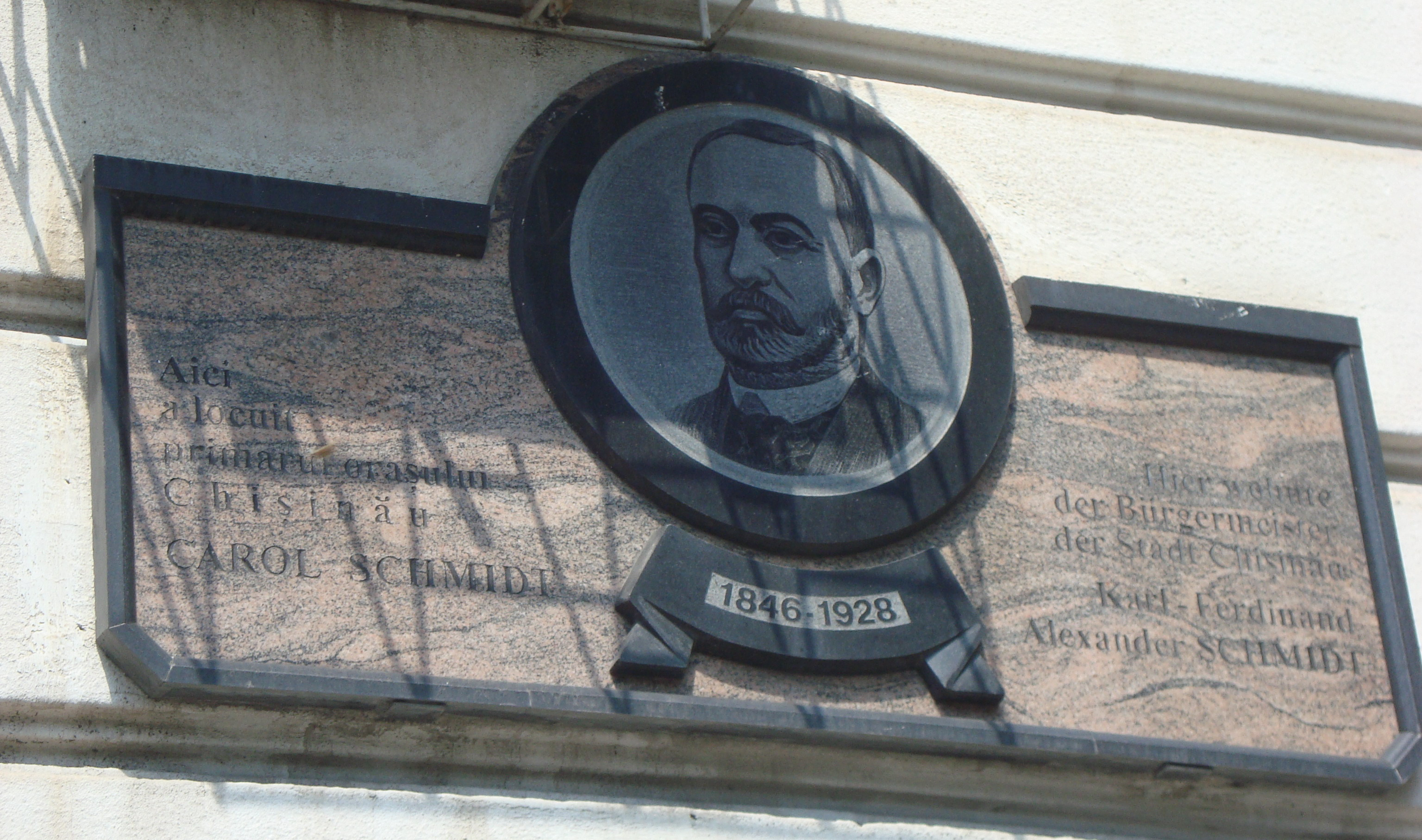 Placă instalată pe casa în care a locuit Carol Schmidt.